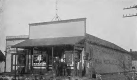 Kansas, USA